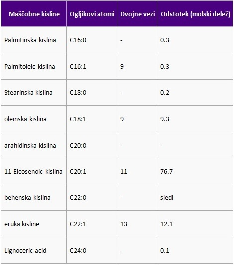 Slika prikazuje vsebnost maščobnih kislin v jojobinem olju